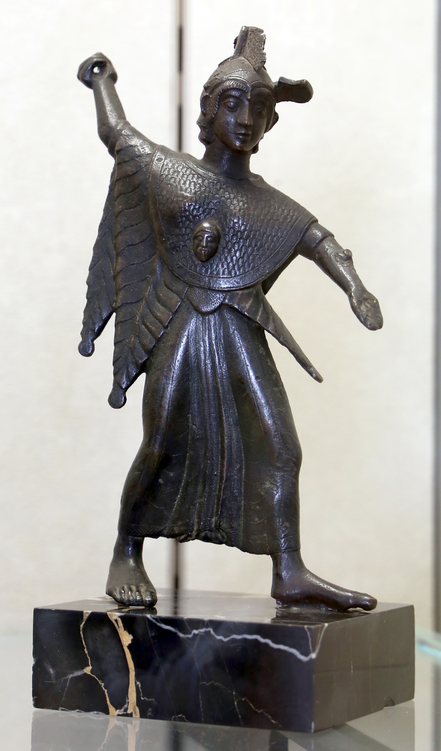 Palazzo_dei_musei_(Modena) This is a photo of a monument which is part of cultural heritage of Italy.